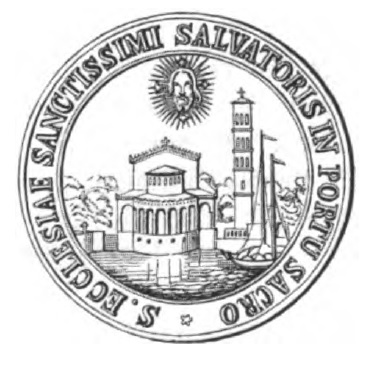 Siegel der Heilandskirche Sacrow, aus Heinrich Theodor Wagener (auch Wagner geschrieben): Sacrow. In: Mittheilungen des Vereins für die Geschichte Potsdams. Band 4 (1867), S. 1–27, hier S. 22.